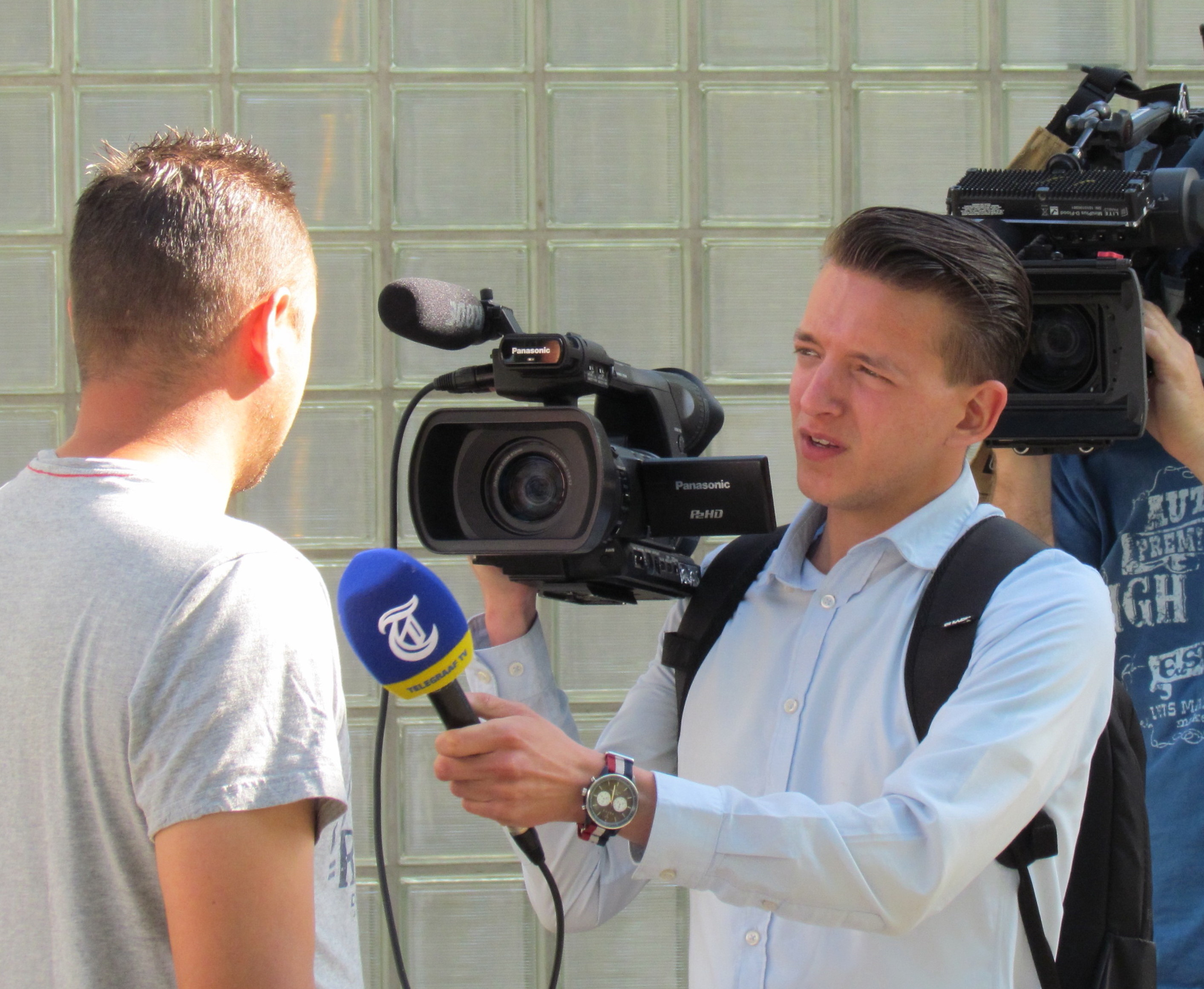 Camerajournalist Frank Nanninga van Telegraaf TV interviewt een inwoner van Apeldoorn